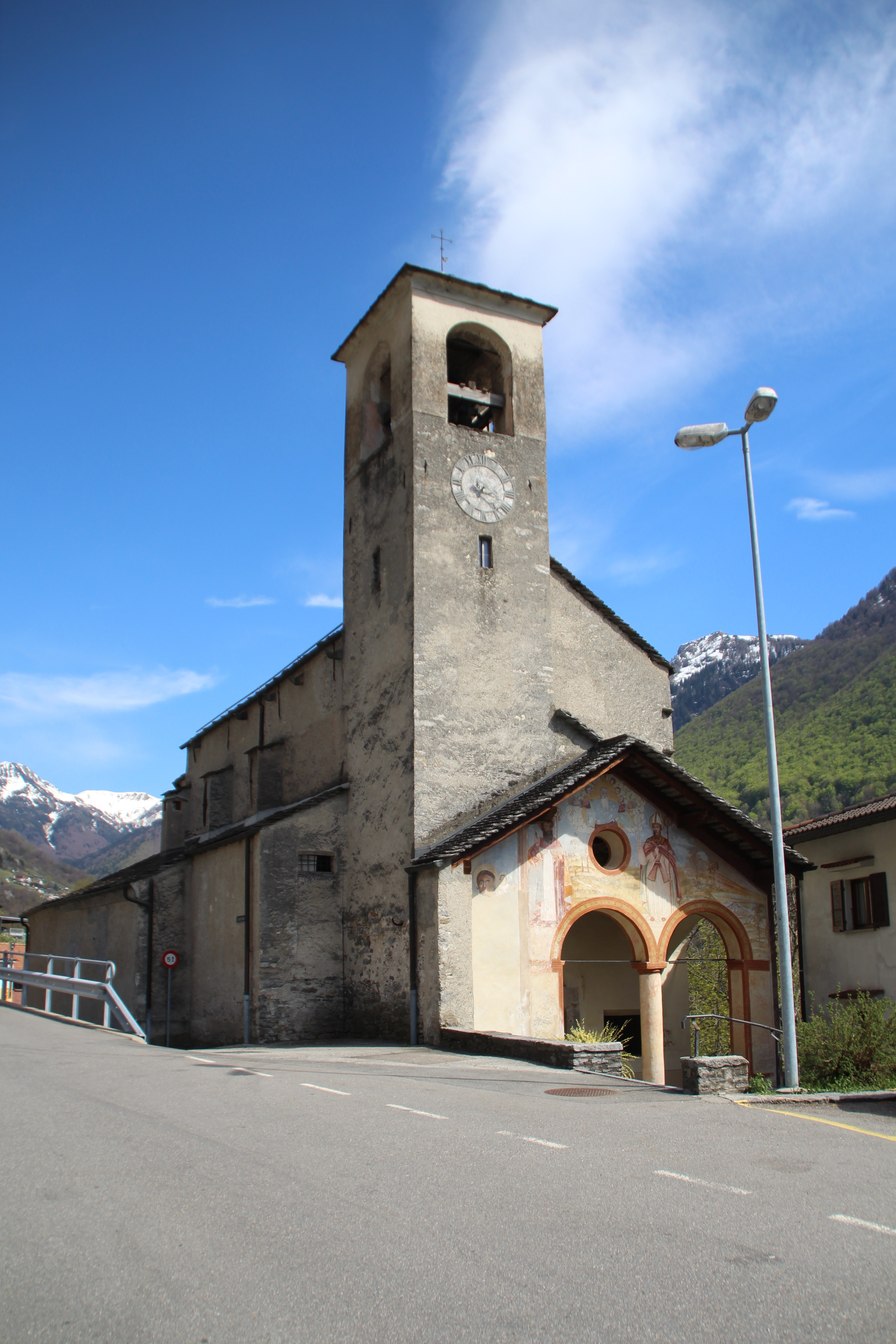 Oratorio S. Bernardino Sant'Antonio TI